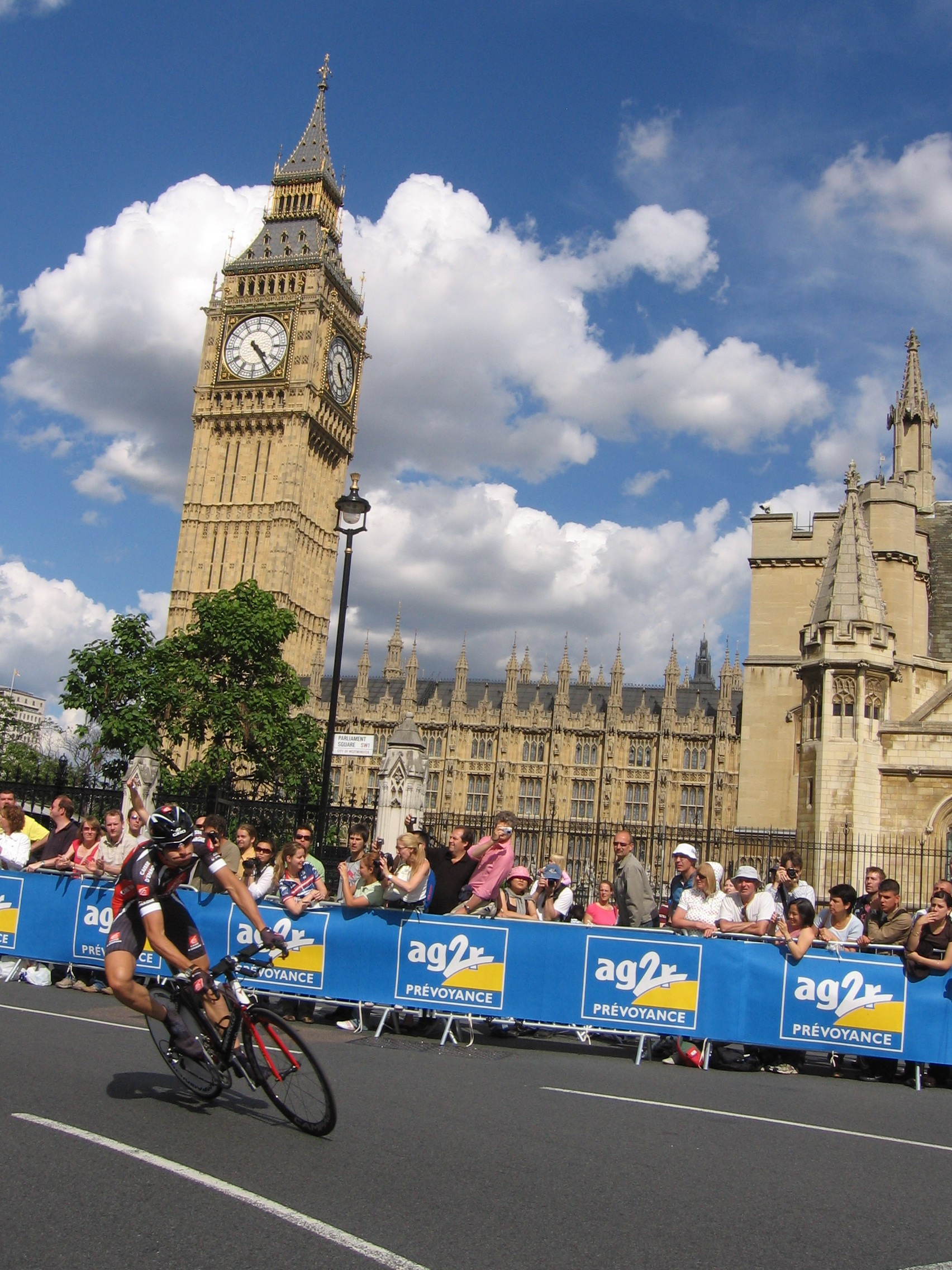 Tour de France 2007 rider passes Big Ben